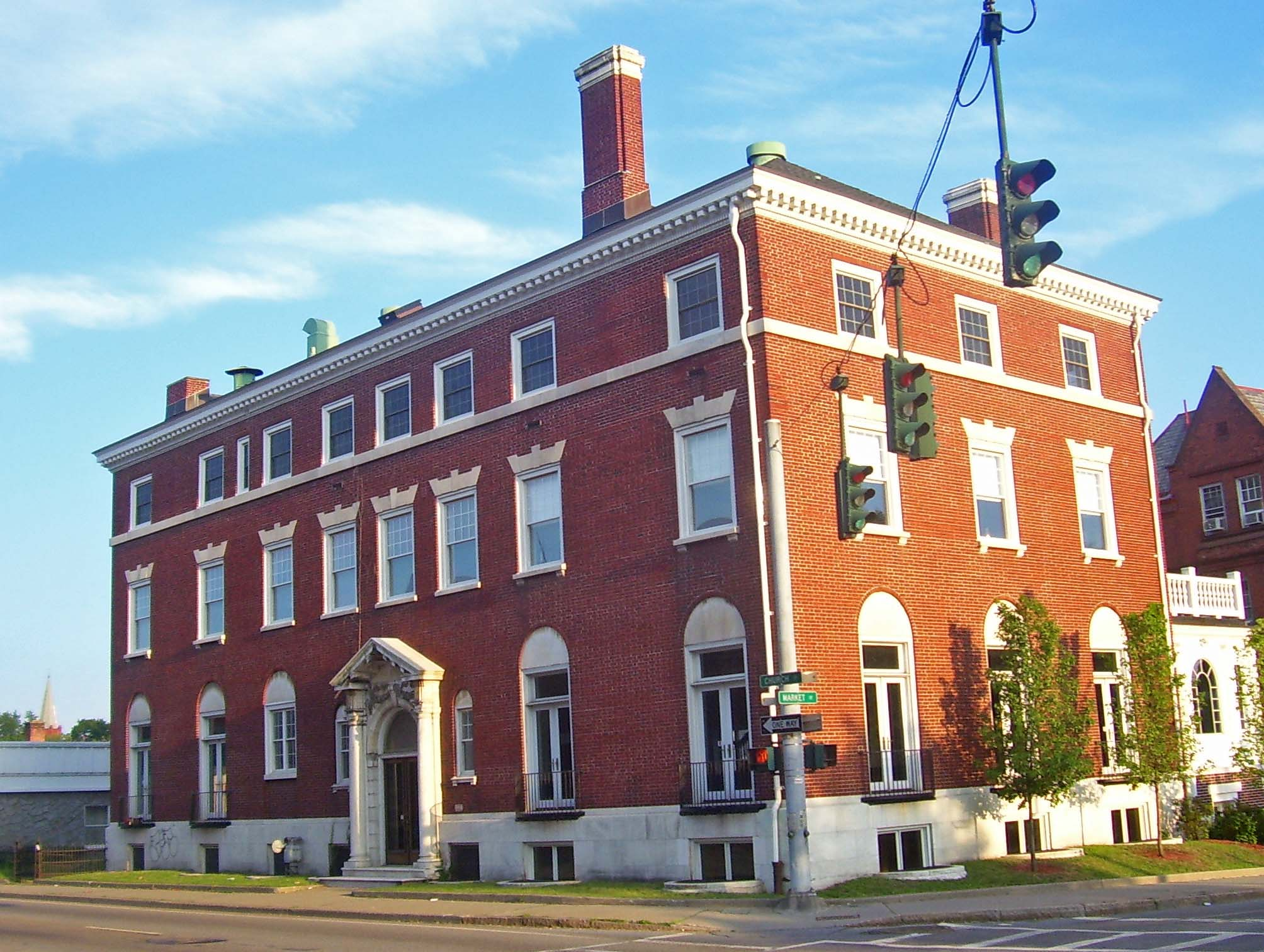 Amrita Club, Poughkeepsie, NY, USA